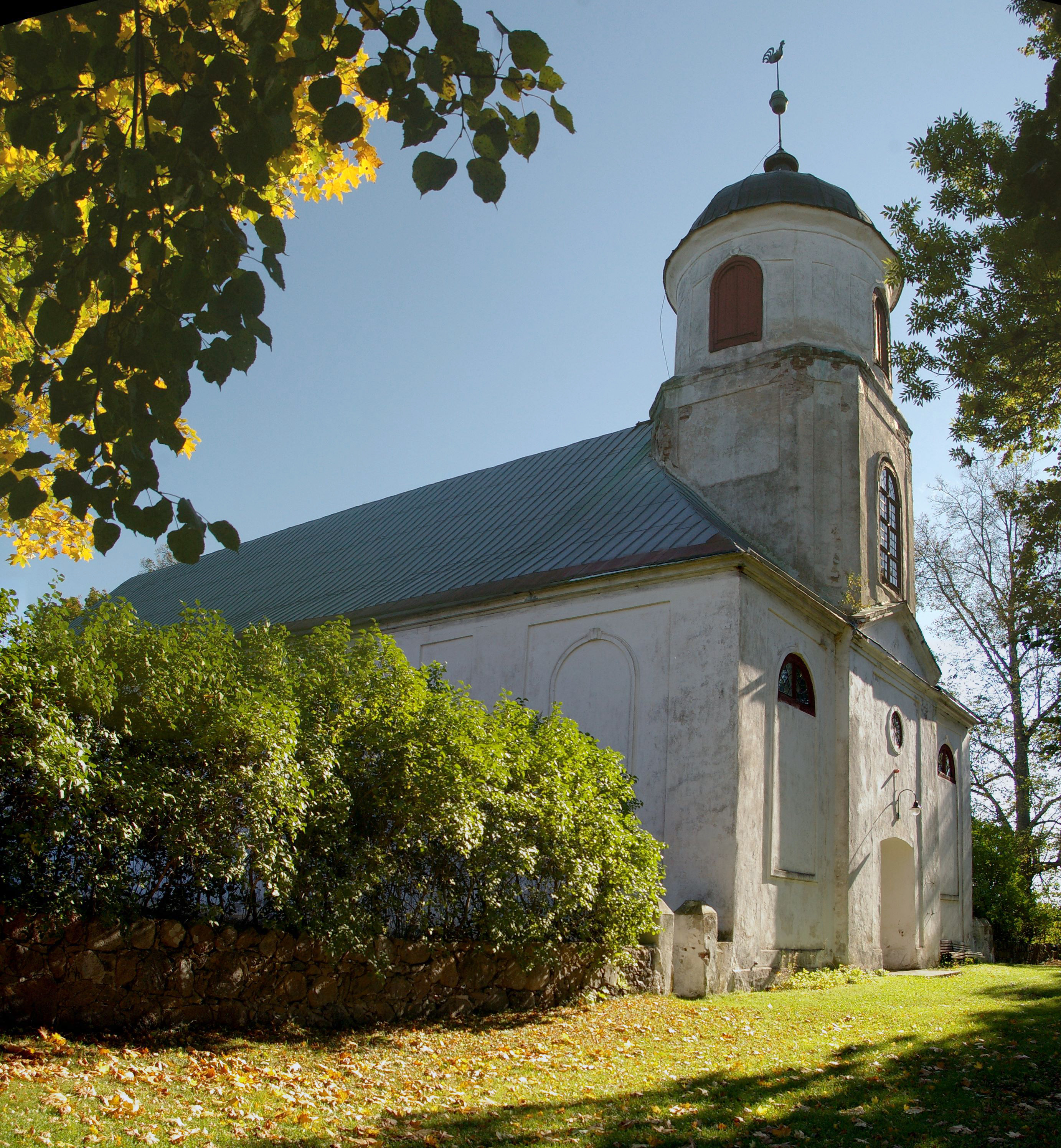 Kodavere Mihkli kirik. Varaklassitsistlik ühelööviline kivikirik